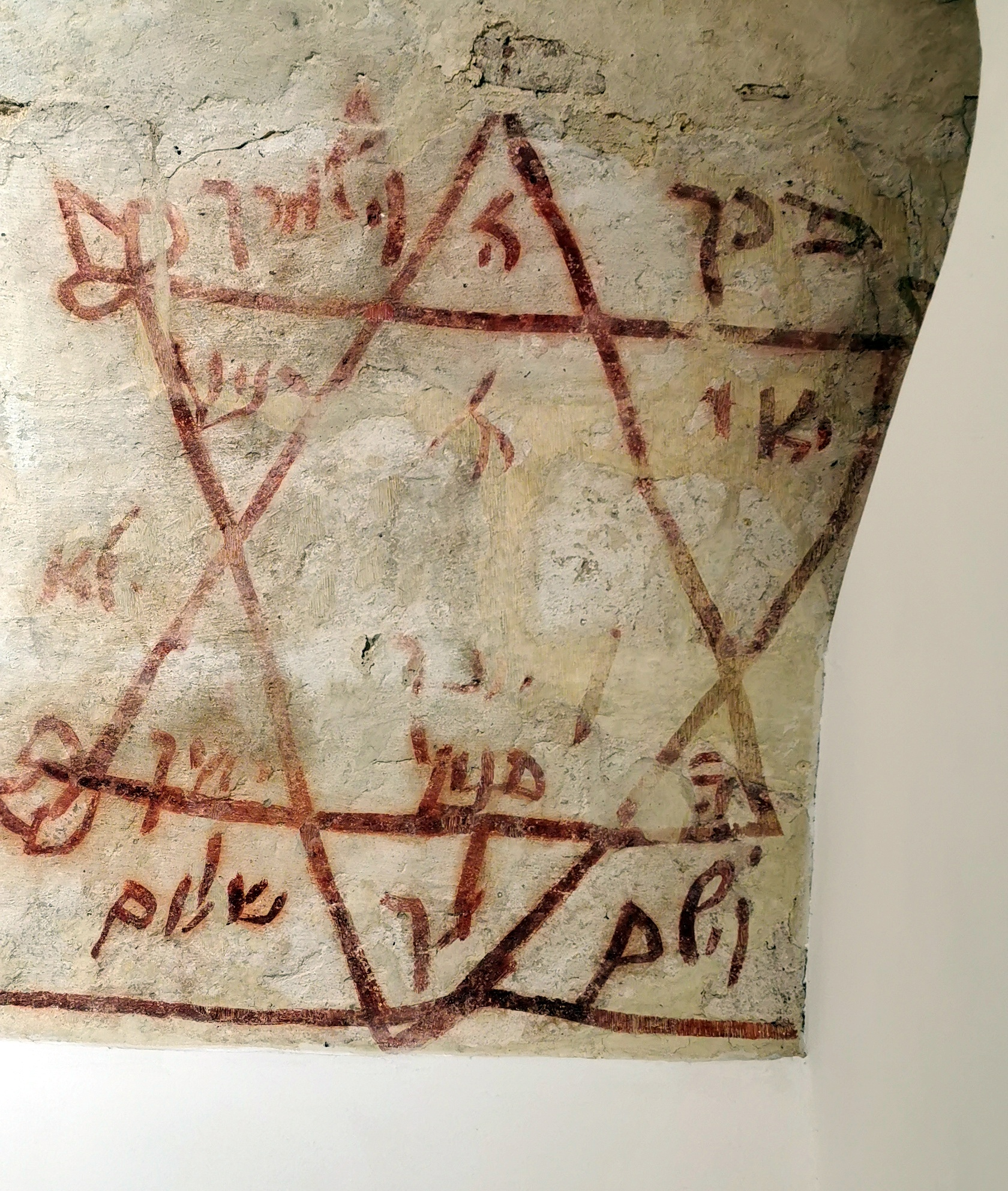 Falkép: Dávid csillagát az ószövetségi papi áldás szövege kíséri, a Károli-fél magyar fordításban: "Áldjon meg téged az Úr, és őrízzen meg tégedet".